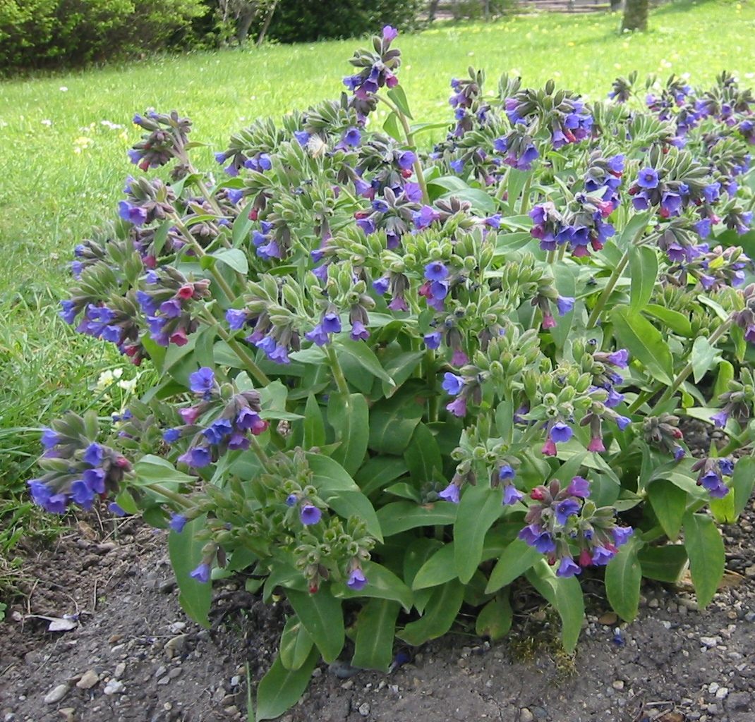 Pulmonaria_mollis; Botanic Garden, Vienna, Austria.